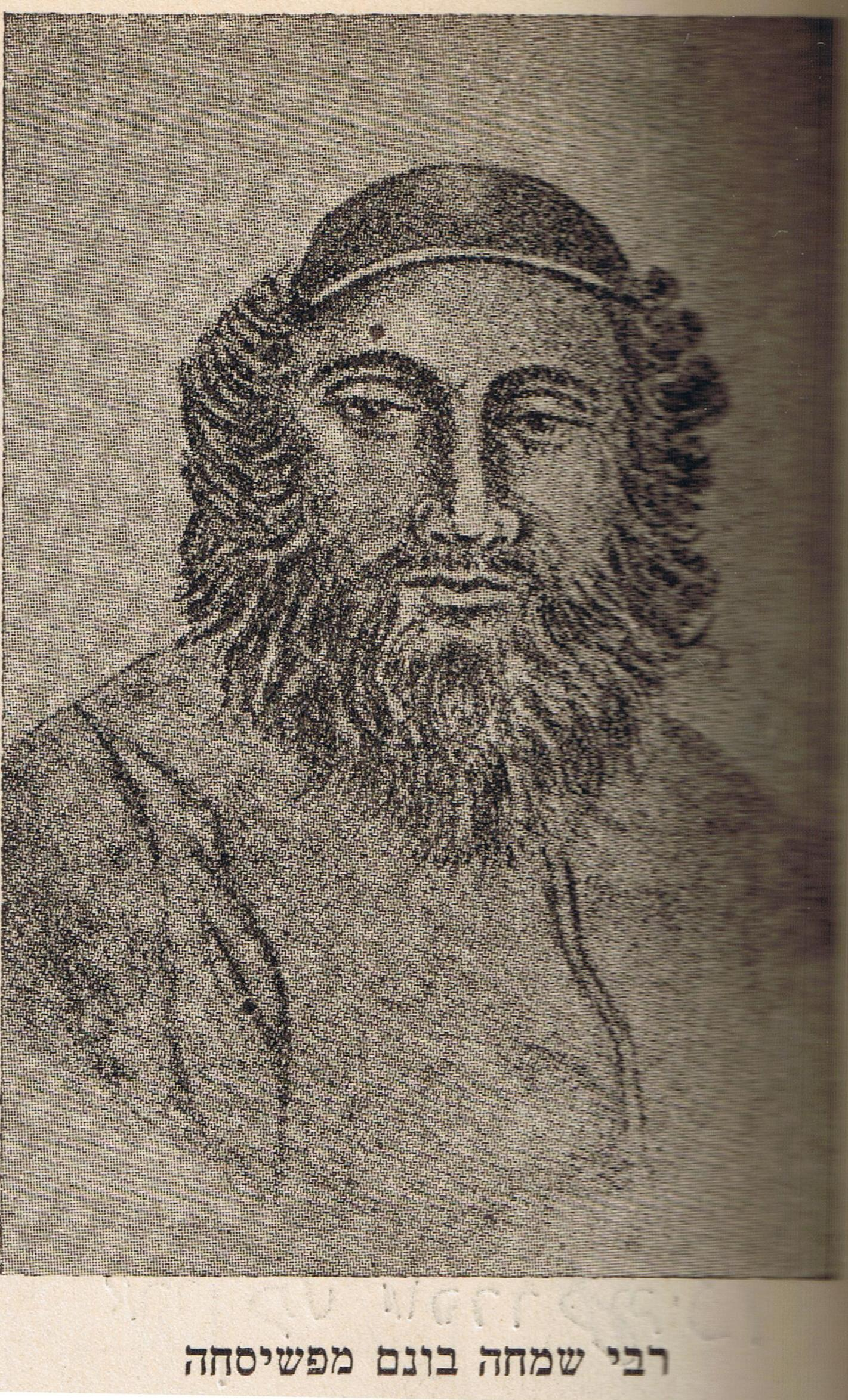 רבי שמחה בונים מפשיסחא